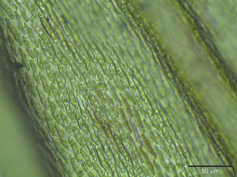 Eichhörnchenschwanz-Weißzahnmoos (Leucodon sciuroides), Laminazellen, Vergrößerung: 400x